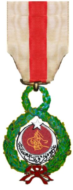 Osmaanse ridderorde